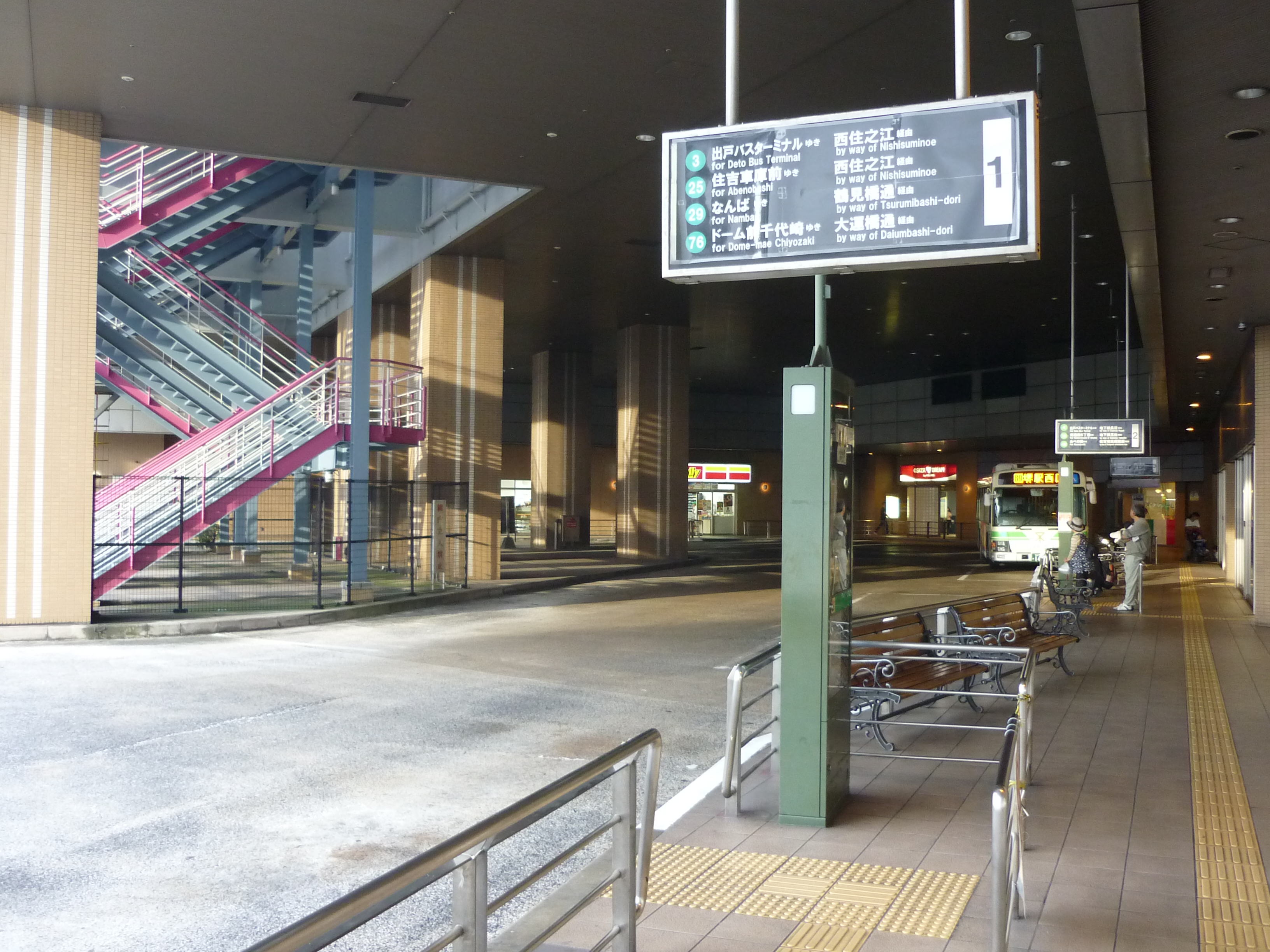 大阪市営バス住之江バスターミナル